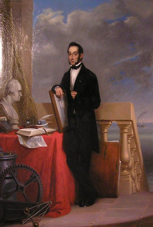 Paul van Vlissingen, schilderij in het Werkspoormuseum te Amsterdam. Geschilderd door van Jan Braet von Uberfeldt, olieverf op doek, 86,6 x 64,7 cm.